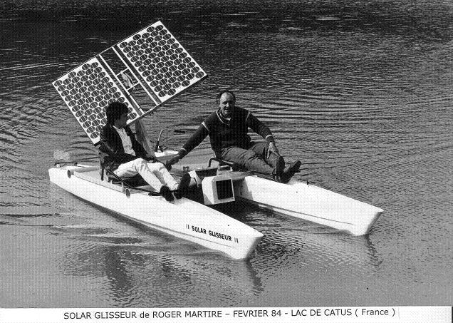 photo numérisée du Solar glisseur en 2008